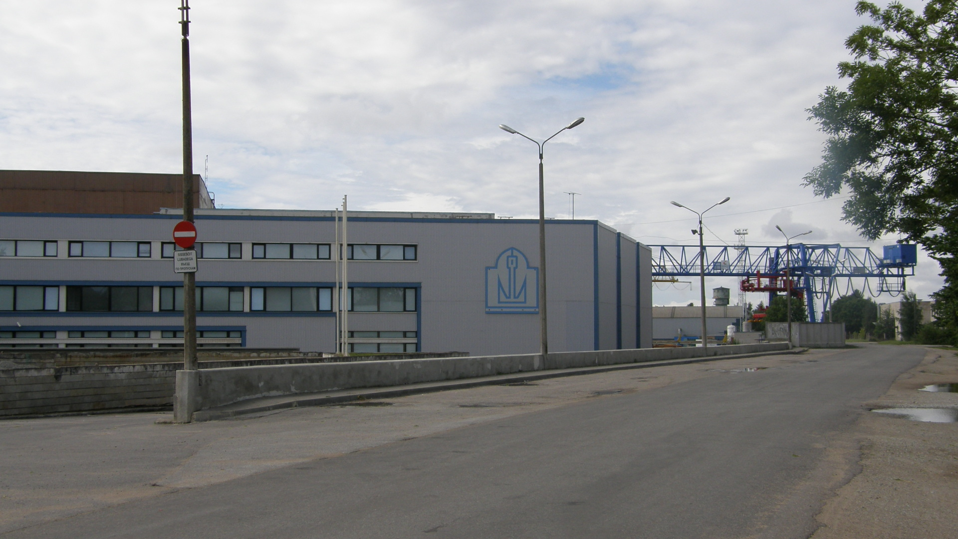 Loksa Laevatehase hoone.